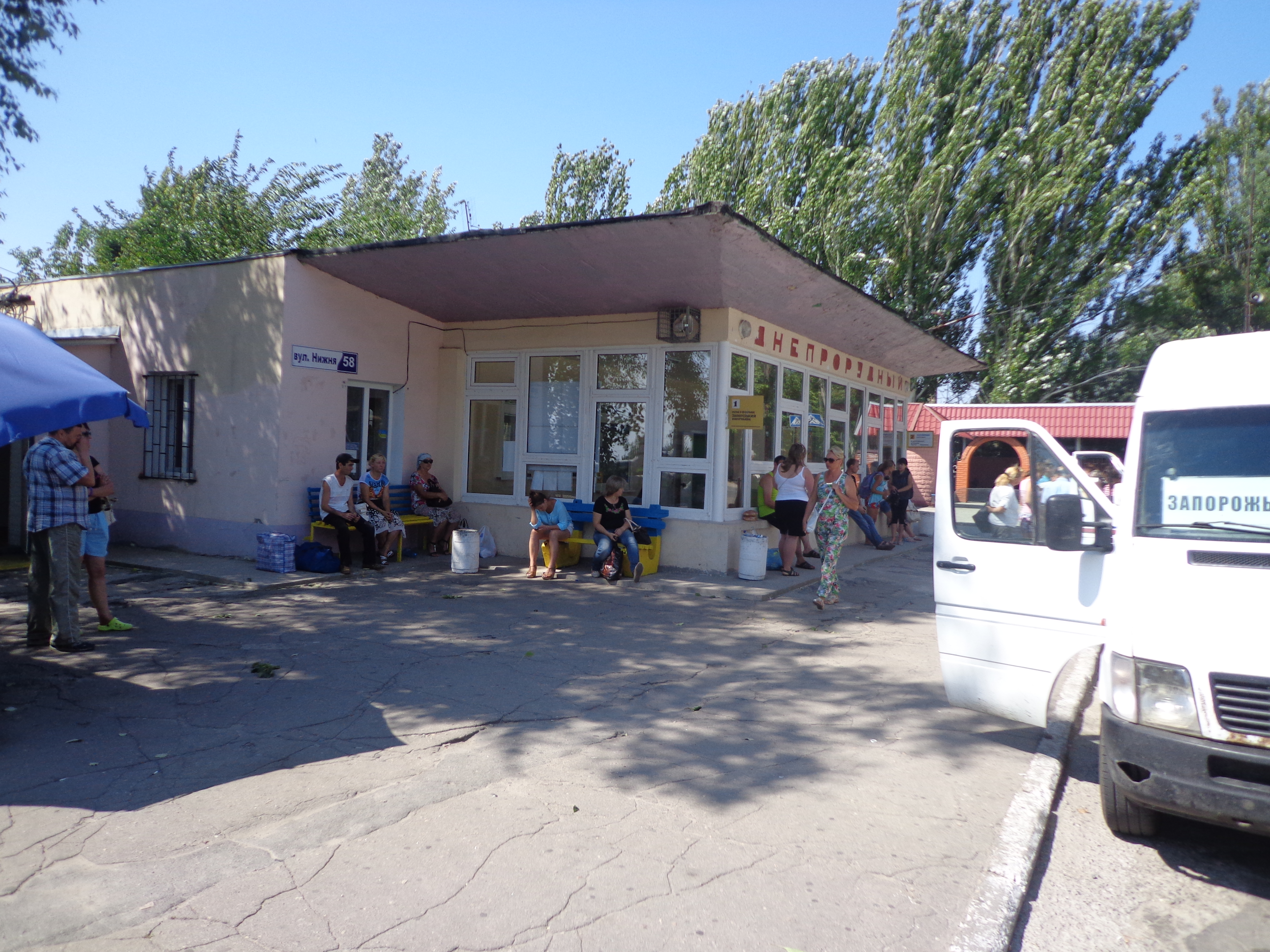 Автостанция. Днепрорудное, Запорожская область, Украина.